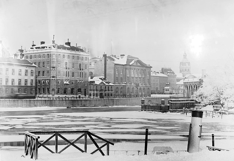 Från Helgeandsholmen mot Strömgatan